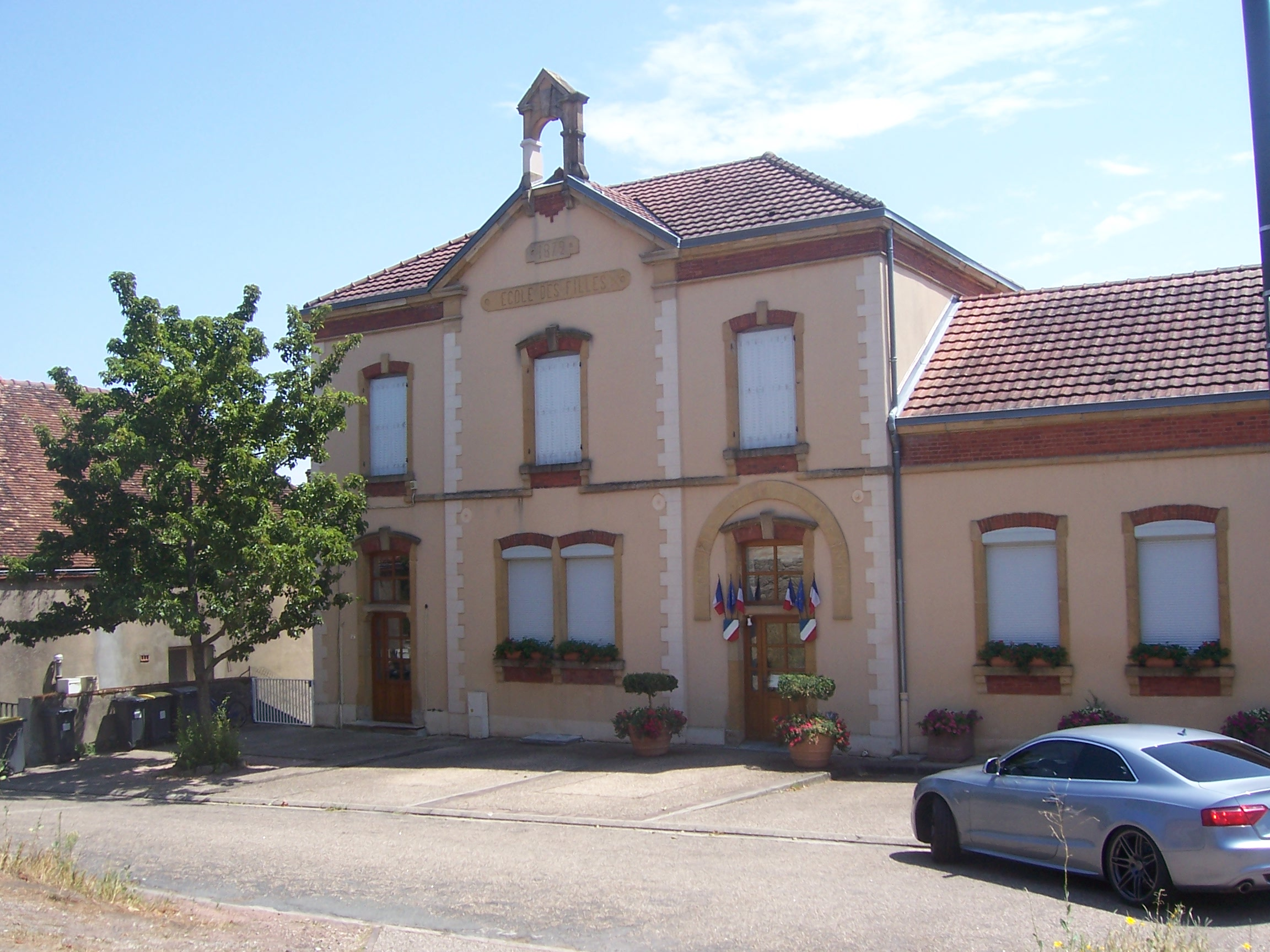 Mairie de Pouilloux